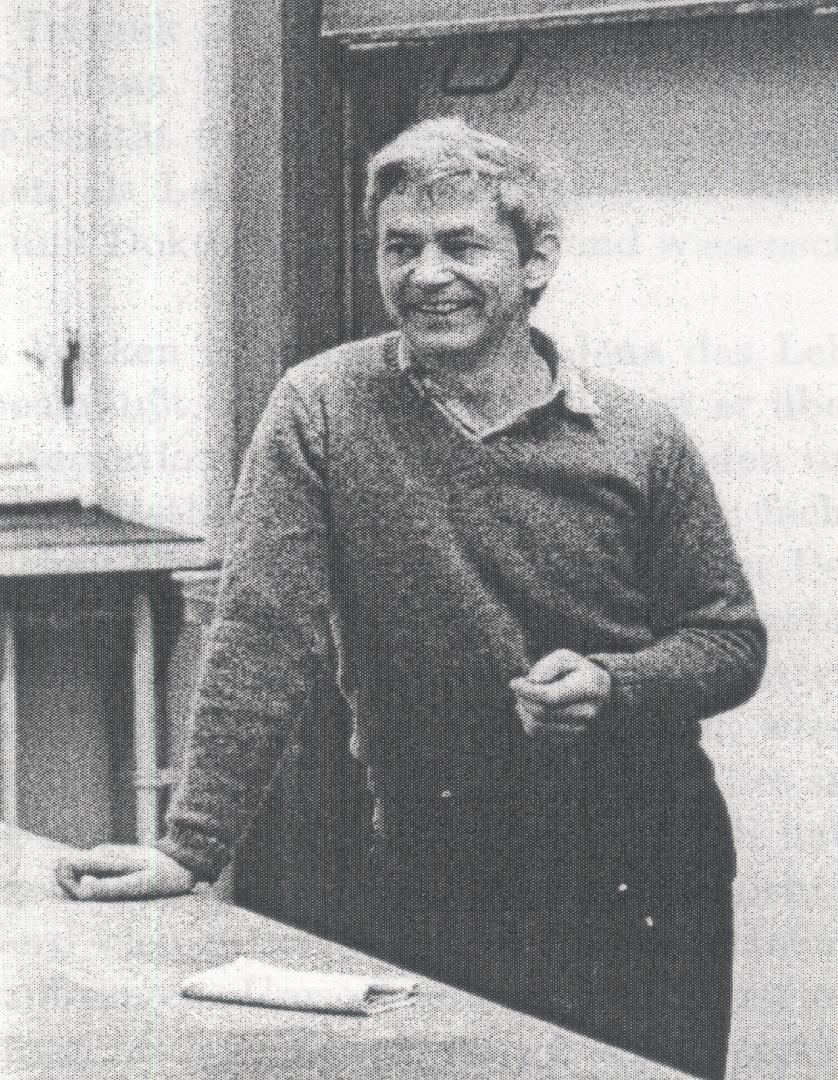 Gerd Wechsung im Abbeanum in Jena vor der Vorlesung.